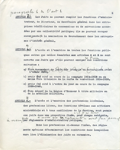 Page annotée de la main de Pétain du Statut des Juifs - page 2